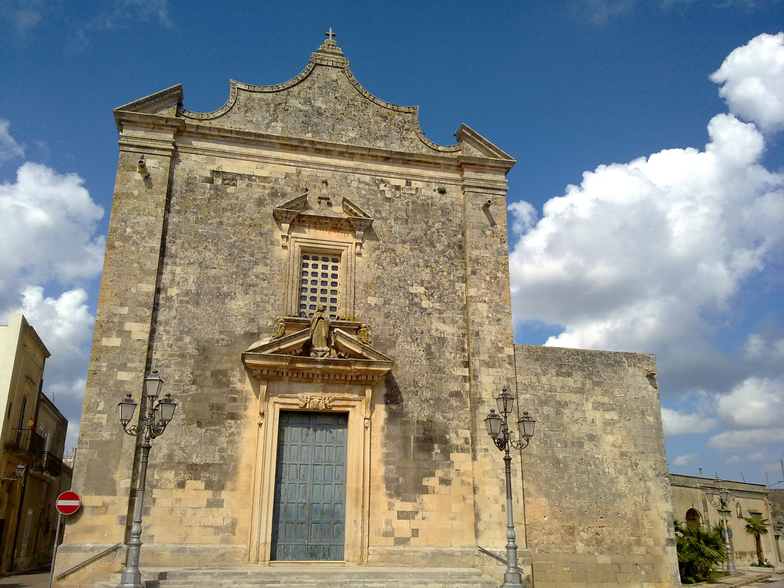 Chiesa madre di Sanarica, Lecce